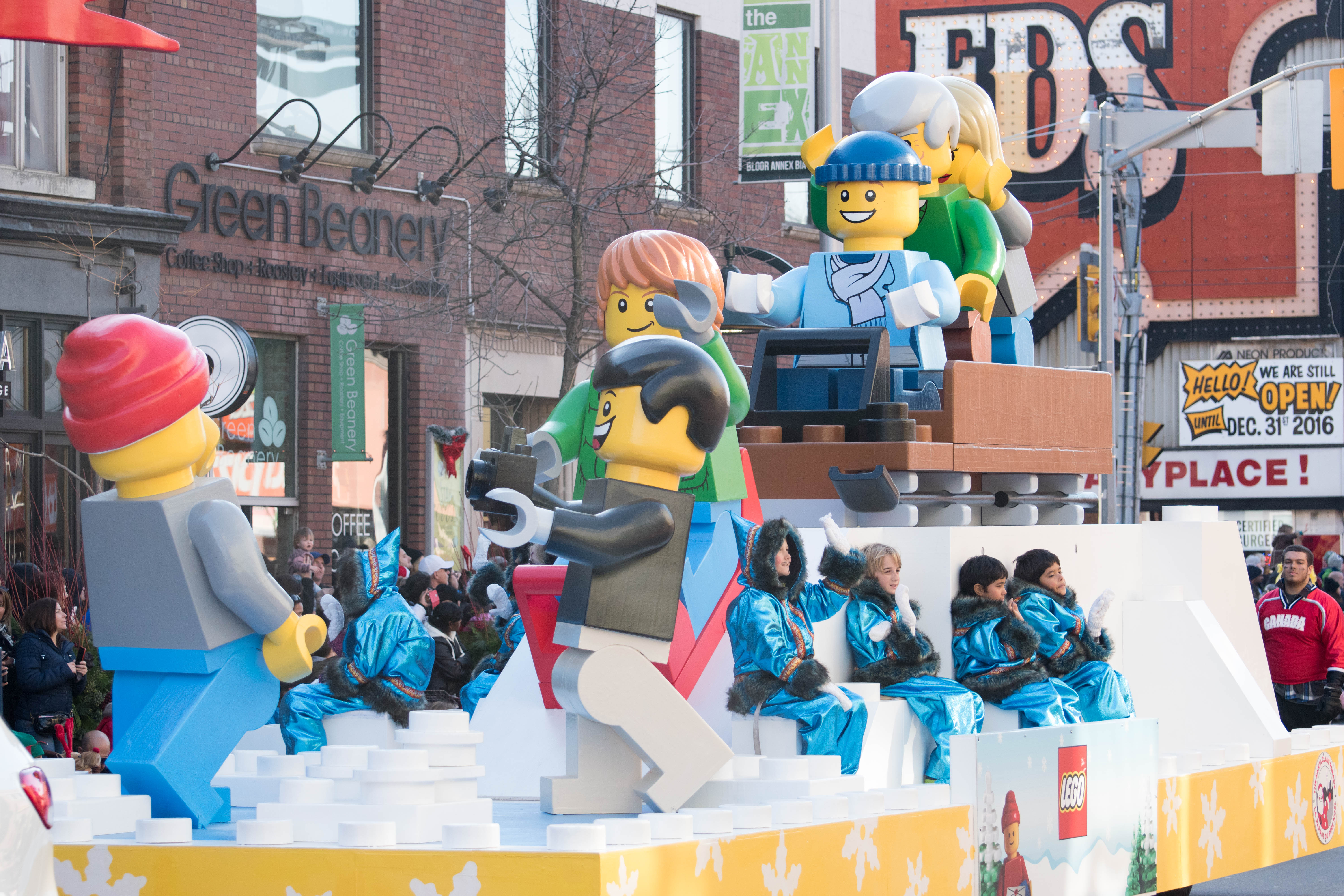 Santa Claus Parade (Toronto)